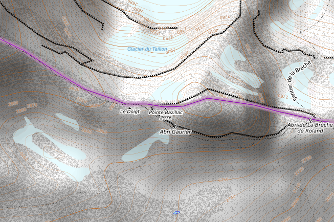 carte réalisée sur umap This map may be incomplete, and may contain errors. Don't rely solely on it for navigation.